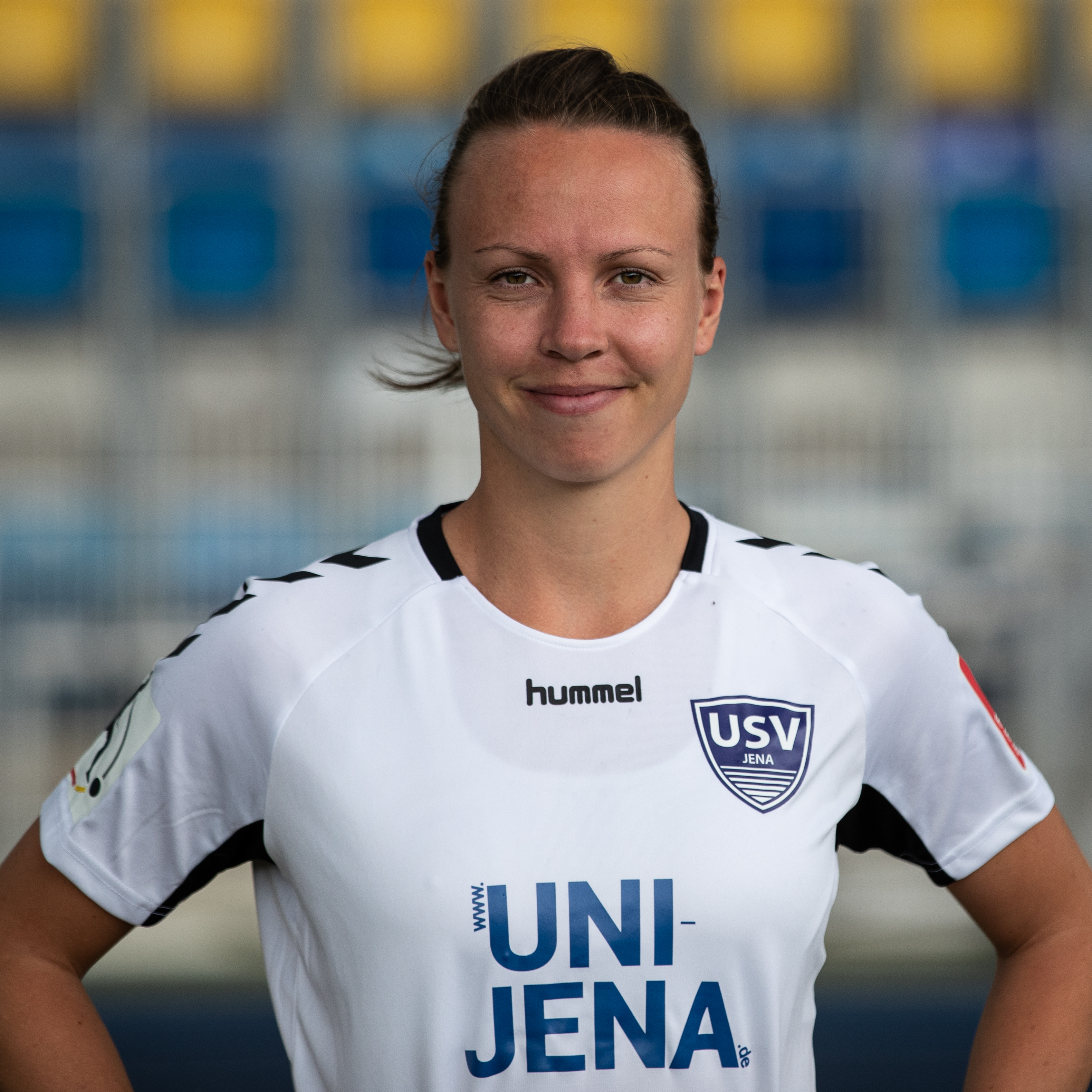 Fußball, Flyeralarm Frauen-Bundesliga, Mannschaftsfotos FF USV Jena; Jana Sedlackova (FF USV Jena, 12); Porträt, Einzelbild